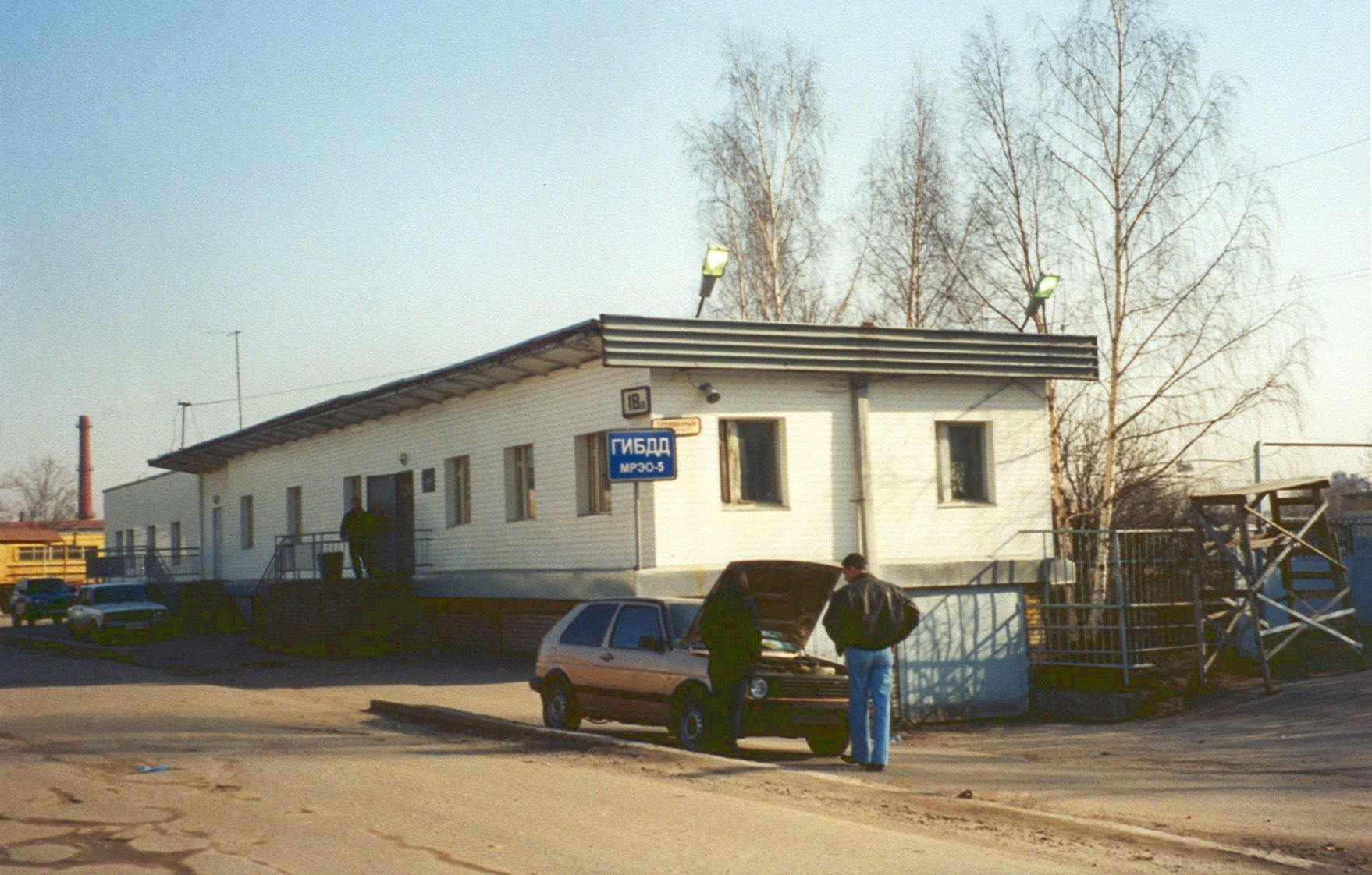 Остатки платформы «Дачное» Ленинградского метрополитена